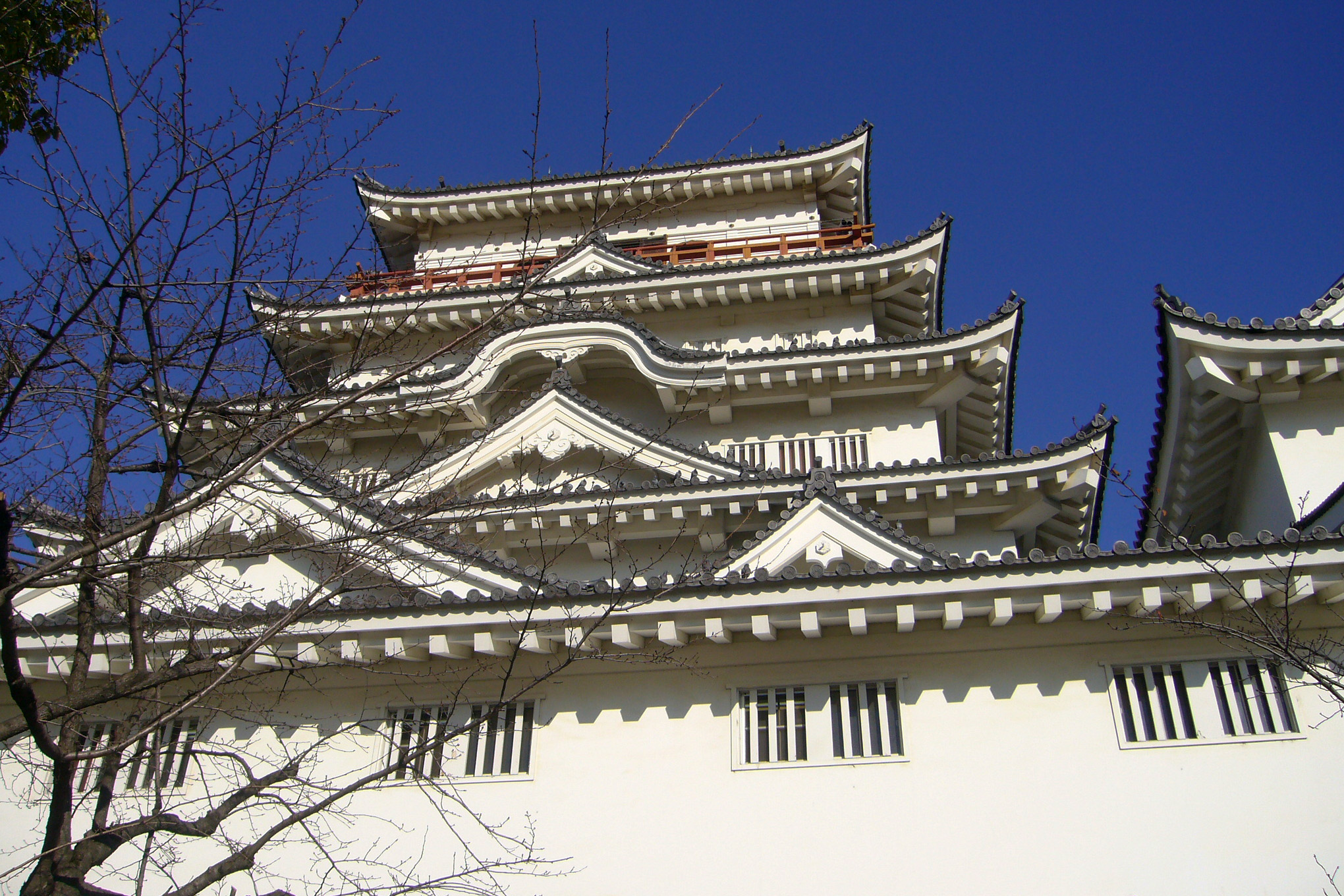 Fukuyama Castle "Tenshu" in Fukuyama, Hiroshima prefecture, Japan